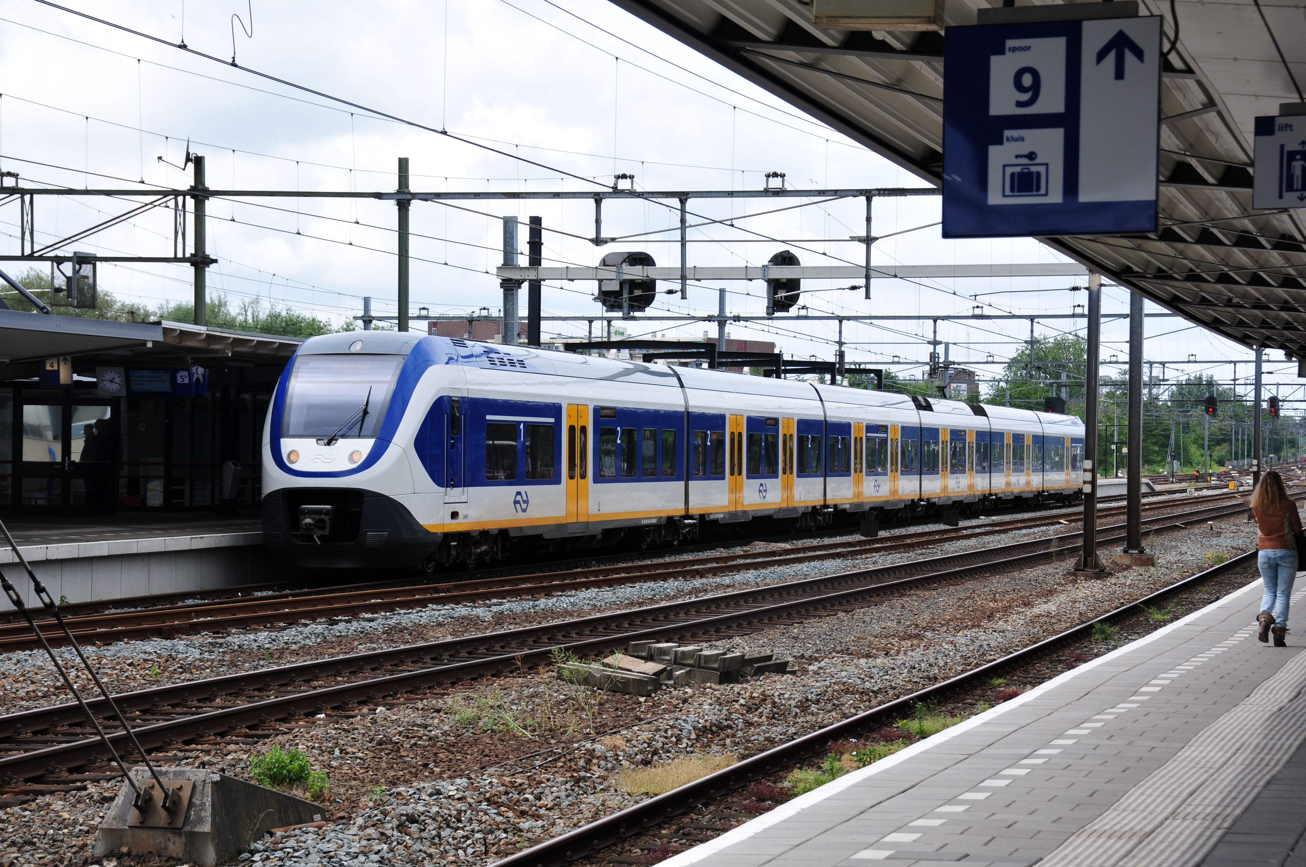 Gouda, Niederlande, Stadtzentrum